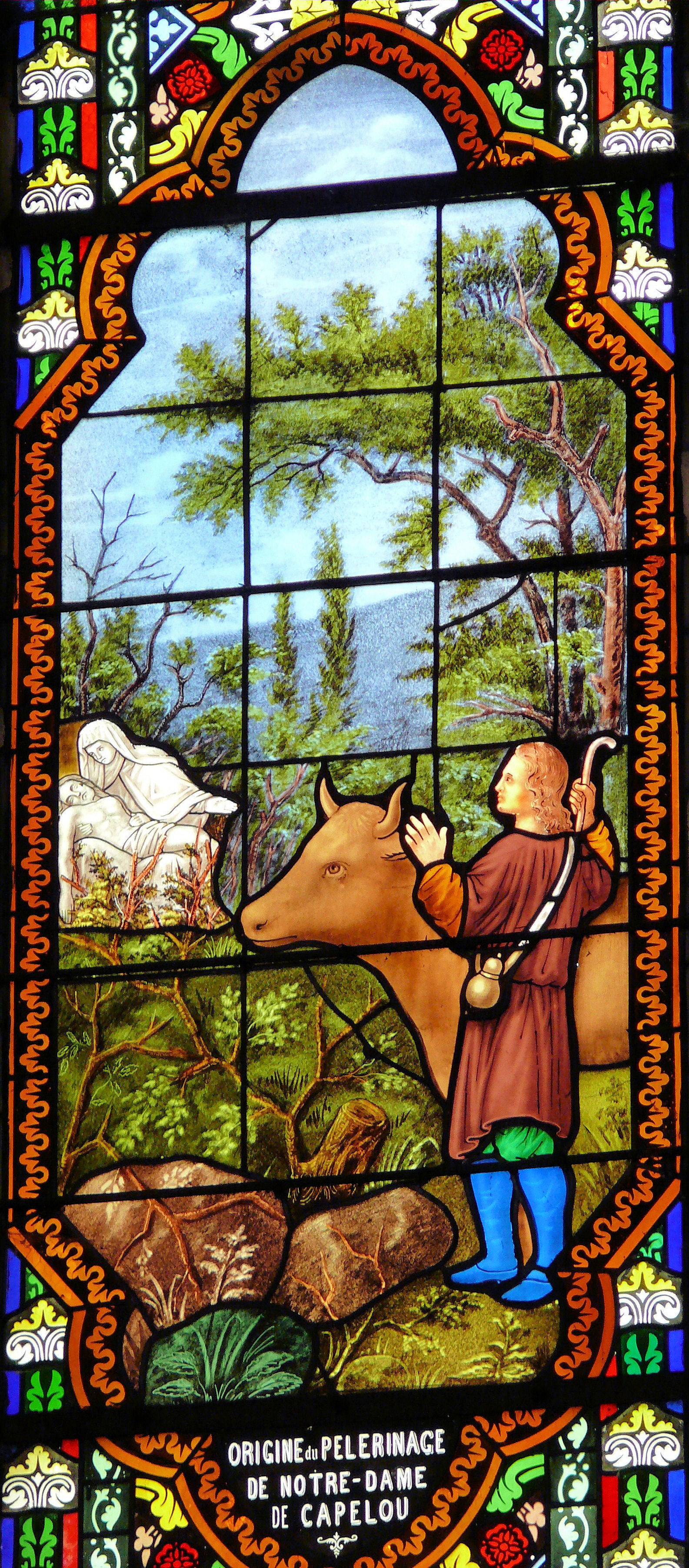 Belvès - Chapelle Notre-Dame de Capelou - Vitrail de l'origine du pélerinage de Notre-Dame de Capelou